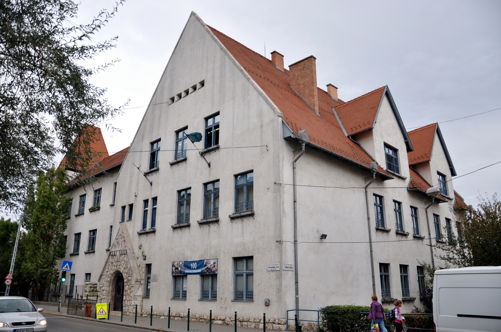 Általános iskola és óvoda (Budapest 12, Városmajor utca 59., Maros utca 60., Temes utca 2.) This is a photo of a monument in Hungary, Identifier: 1175